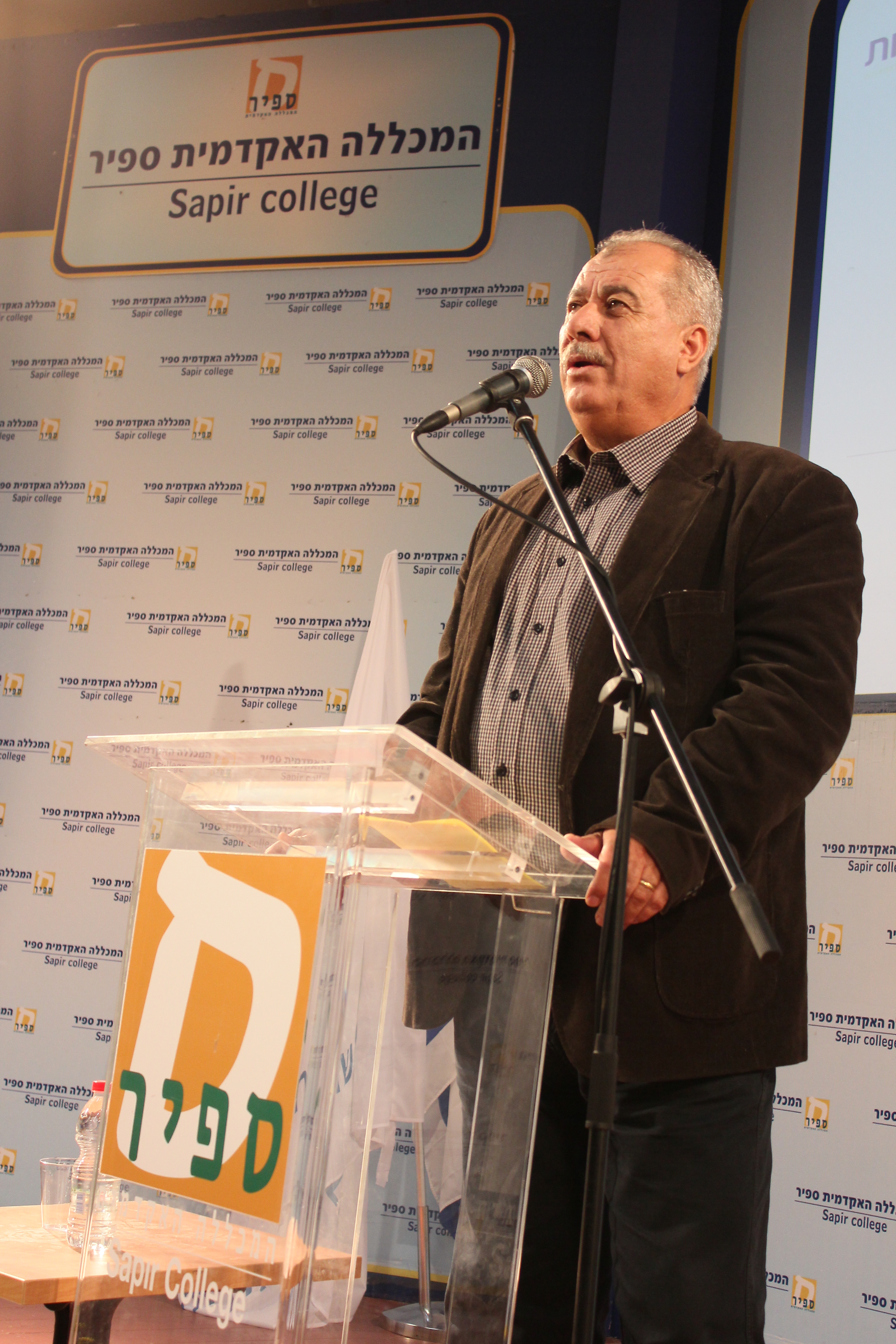 כנס שדרות לחברה במכללה האקדמית ספיר ובעיר שדרות 2015